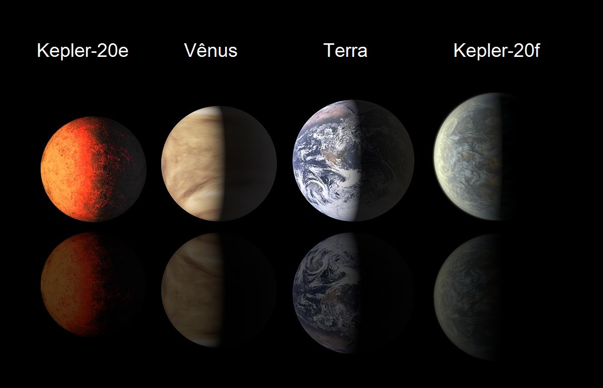 Comparação de tamanho de outros planeta com a Terra.